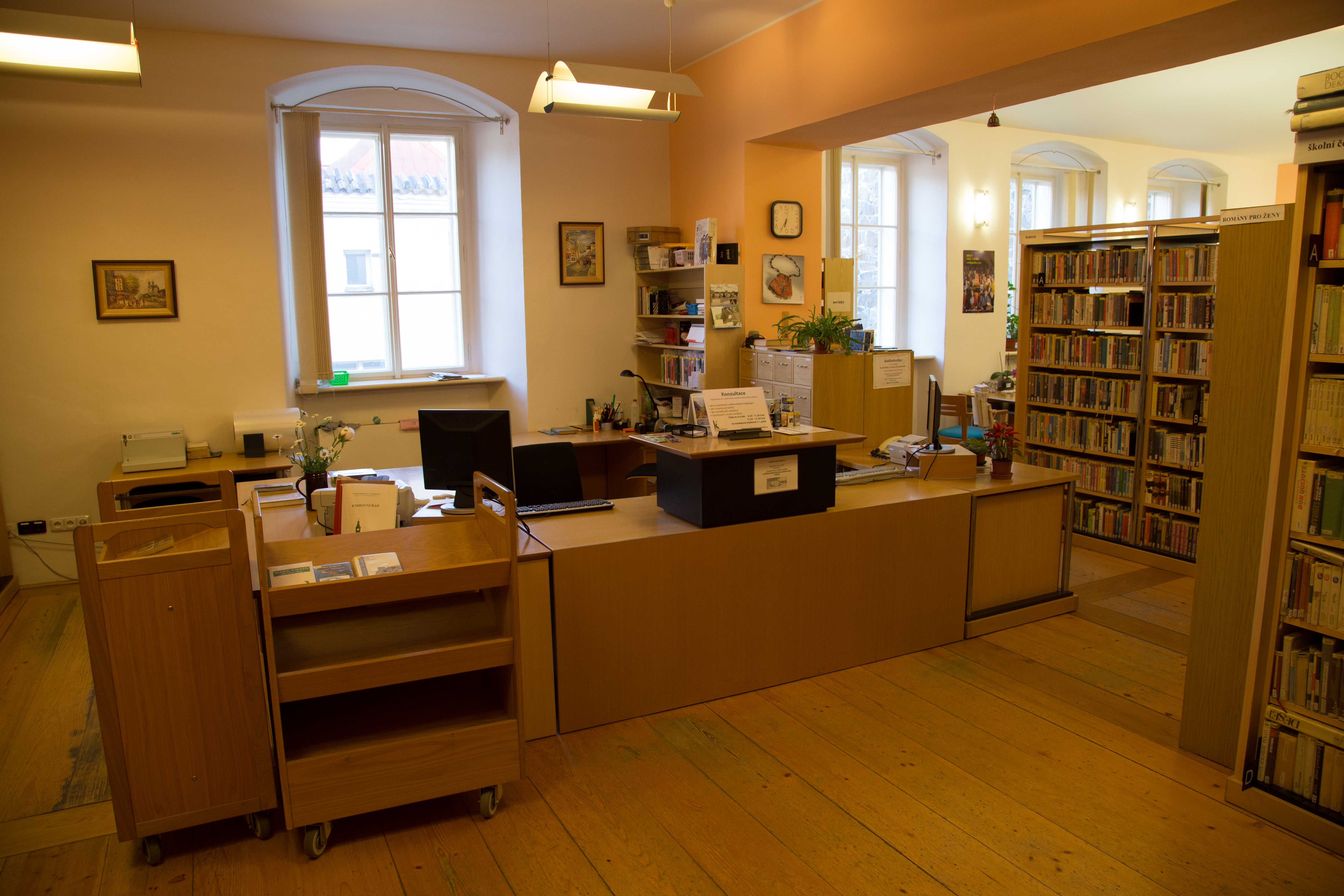 oddělení beletrie Krajské knihovny v Pardubicích, 2014